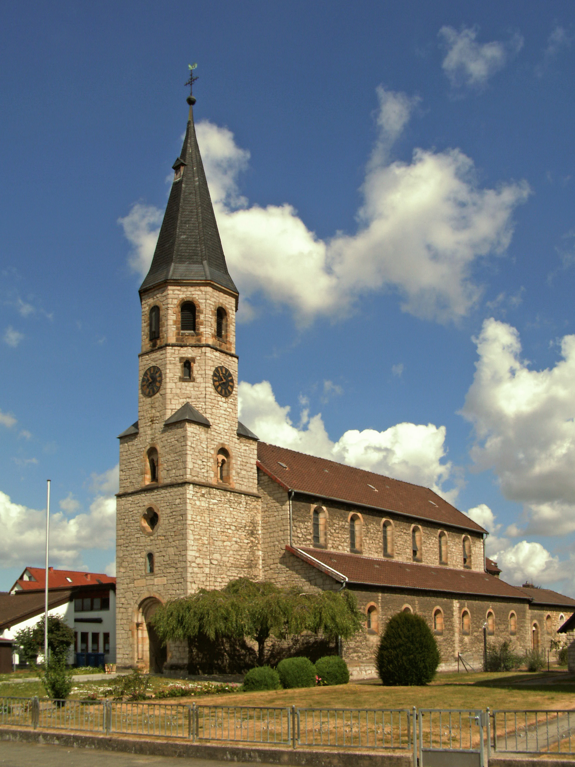 Katholische Kirche Unbefleckte Empfängnis Maria in Bavenstedt, Stadtteil von Hildesheim